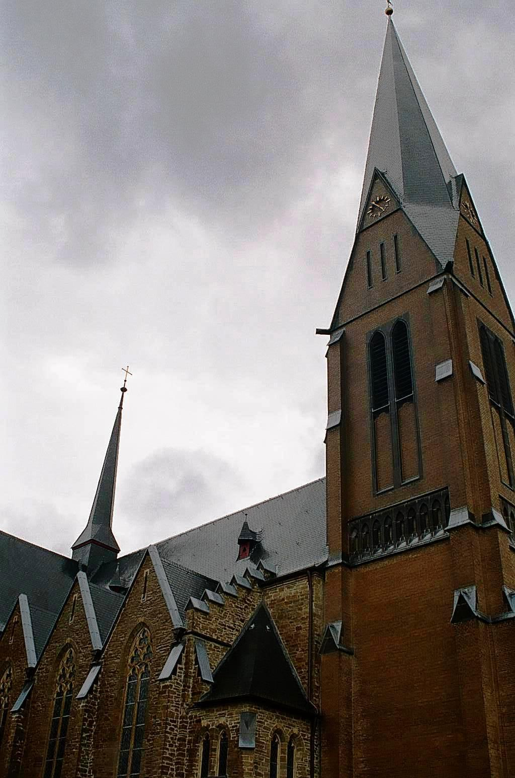 Katholische Pfarrkirche Sankt Simon und Judas in Hennef